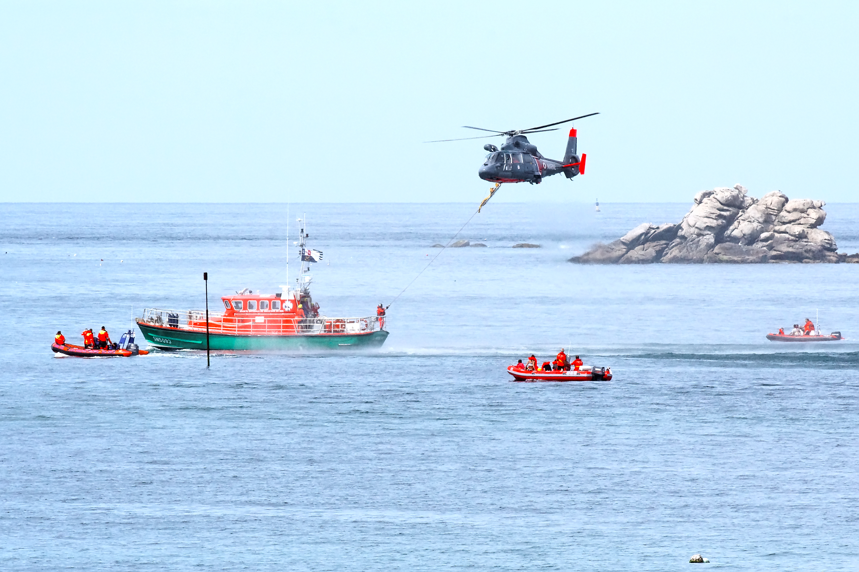 La Portsallaise (SNS 093), canot tous temps de la S.N.S.M. lors d'un exercice hélitreuillage avec un hélicoptère SA365 Dauphin de l'aéronautique navale française.